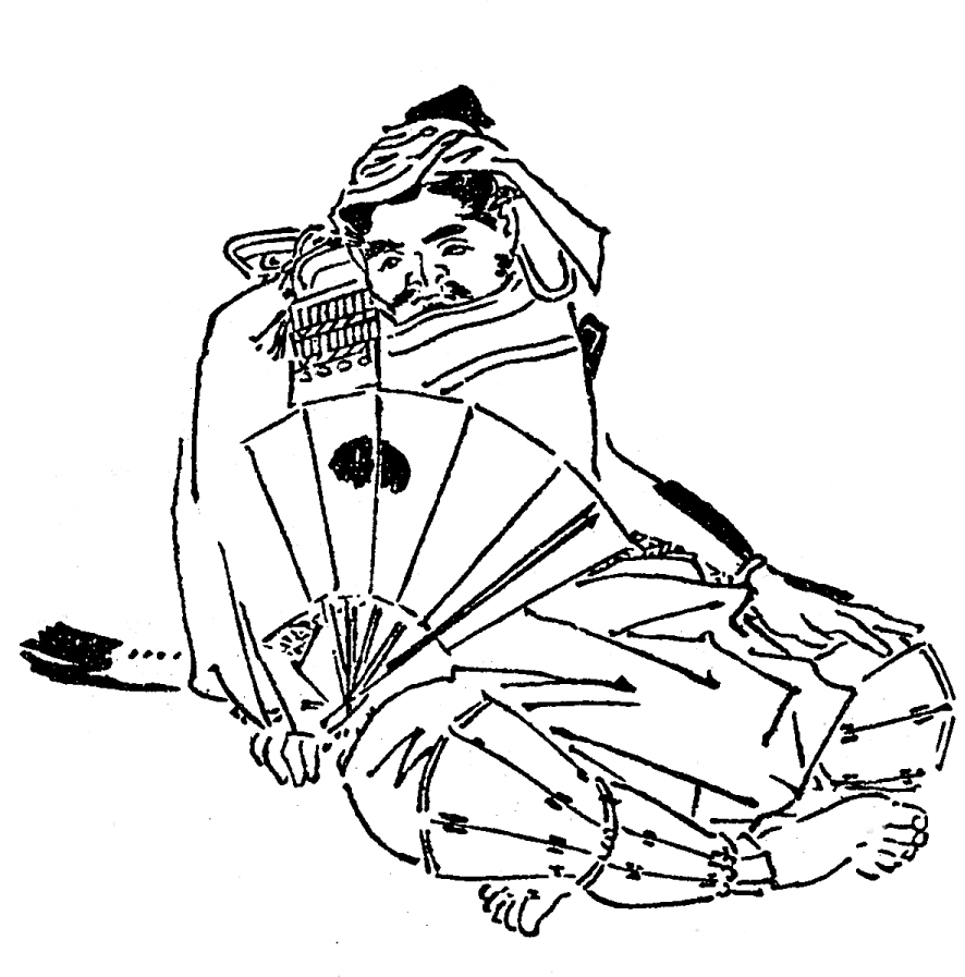 八田知家、平安時代末期 - 鎌倉時代初期の武将。／江戸時代『前賢故実』より。画：菊池容斎